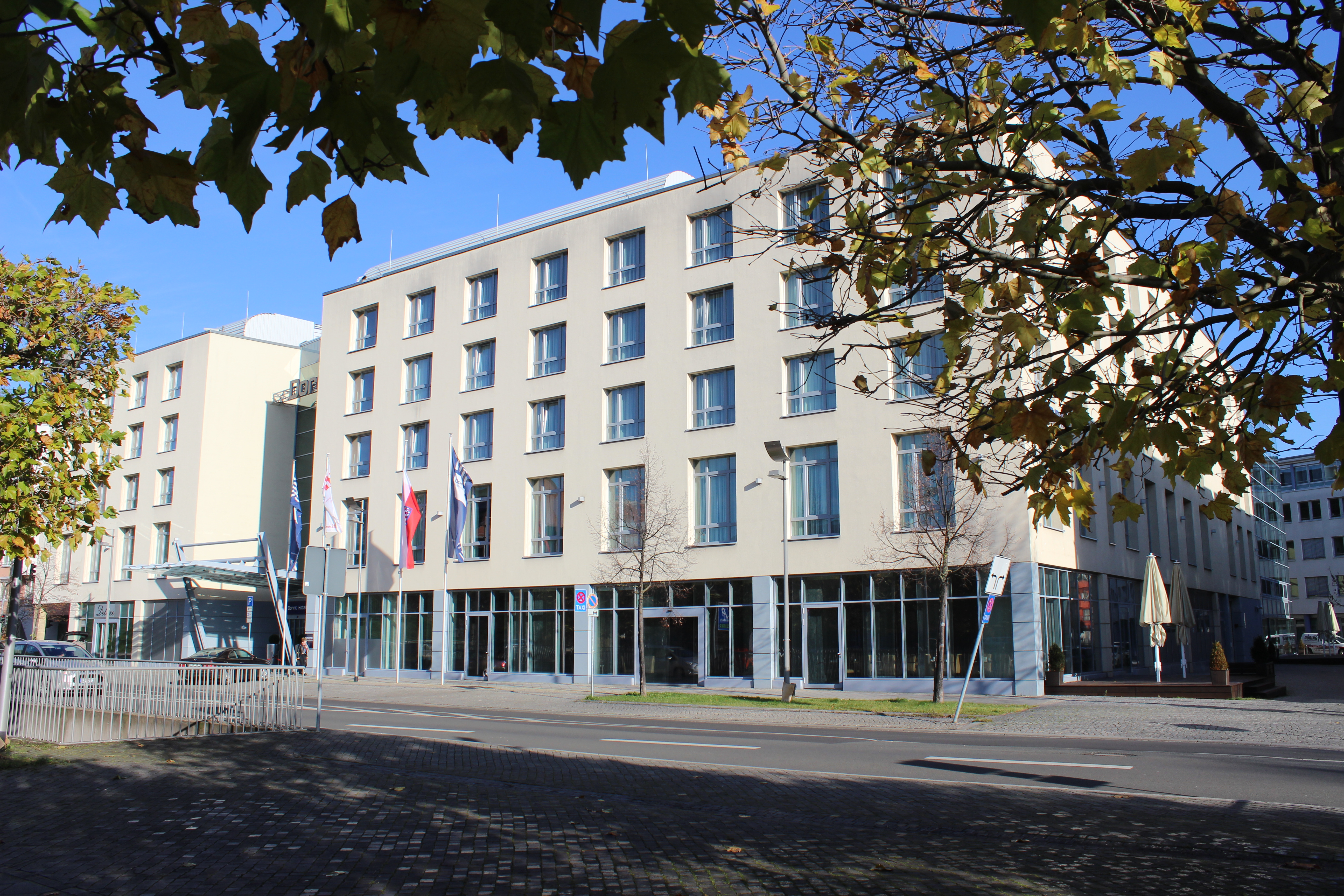 Hotel am Dom